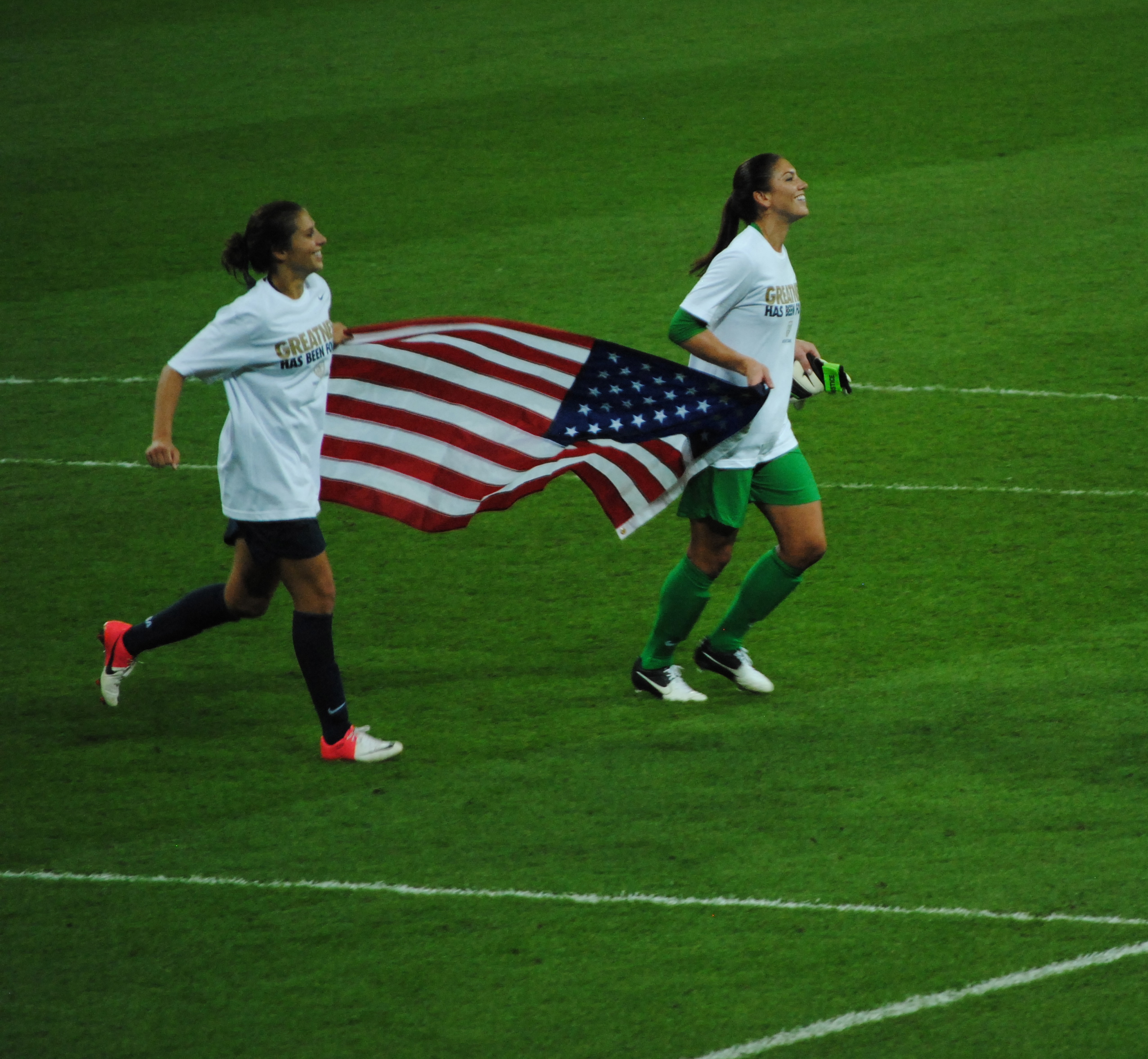 USA vs Japan